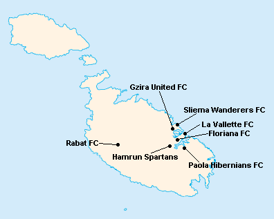 Répartition des clubs en First Division Maltaise 1964-1965.